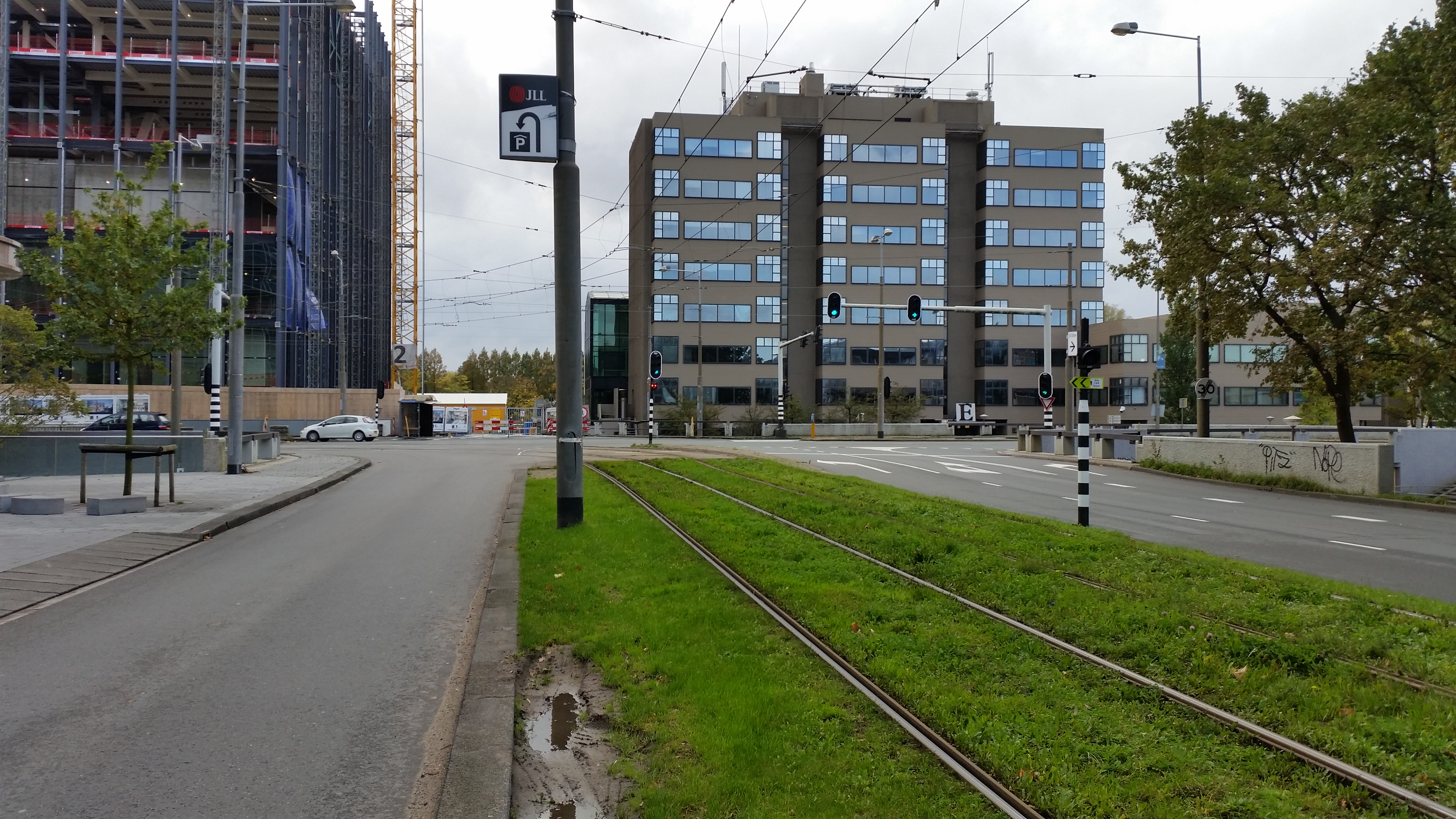 Brug 859 in de Strawinskylaan over de Parnassusweg, Amsterdam-Zuid; achtergrond Rechtbank Amsterdam